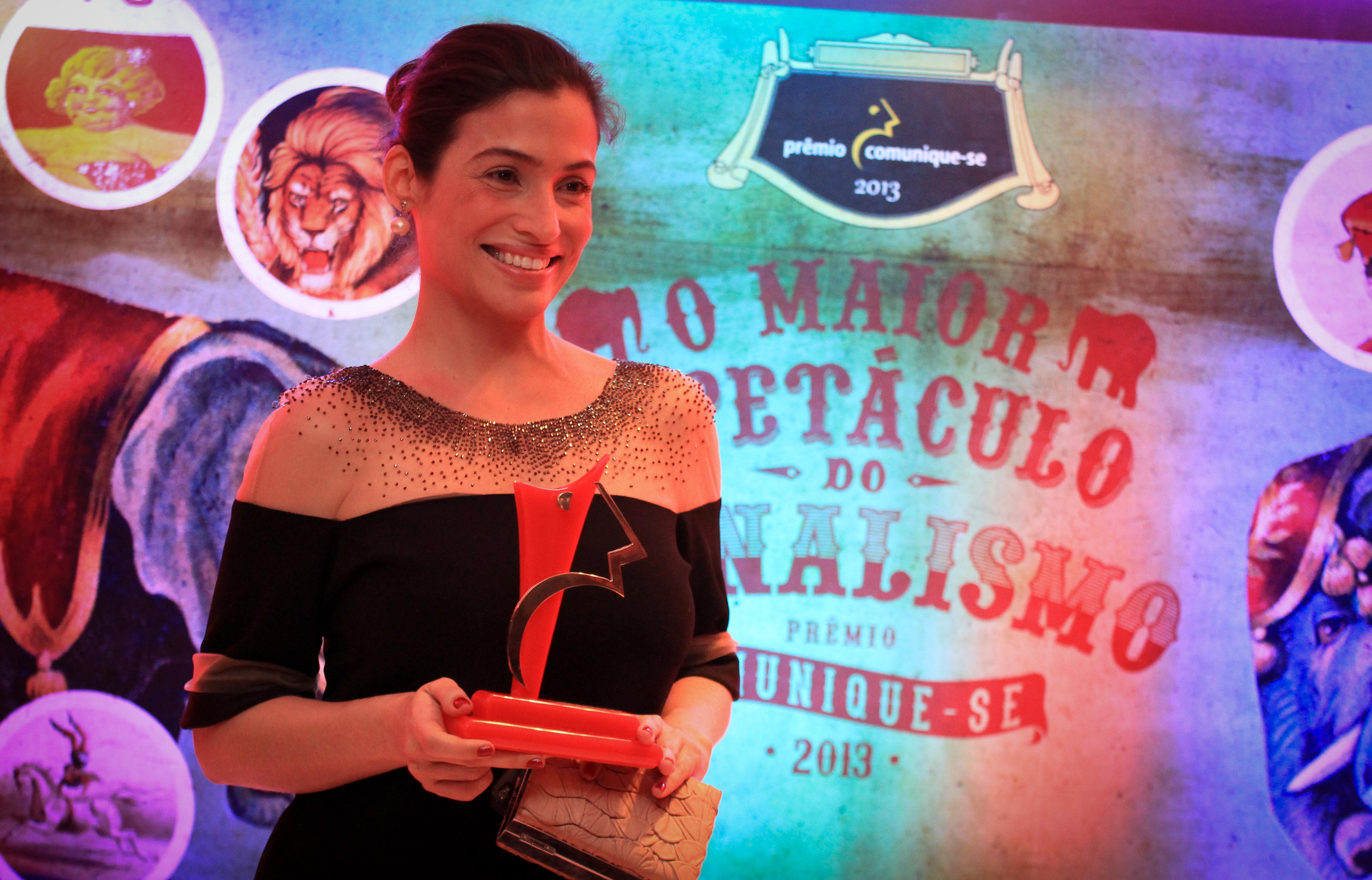 Renata Vasconcellos, jornalista do Brasil.